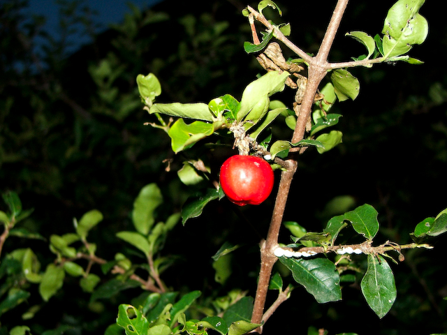 A Acerola